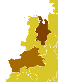 Bistum Münster mit Hervorhebung des Offizialatsbezirks Vechta